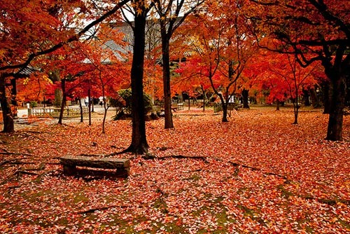 mùa thu